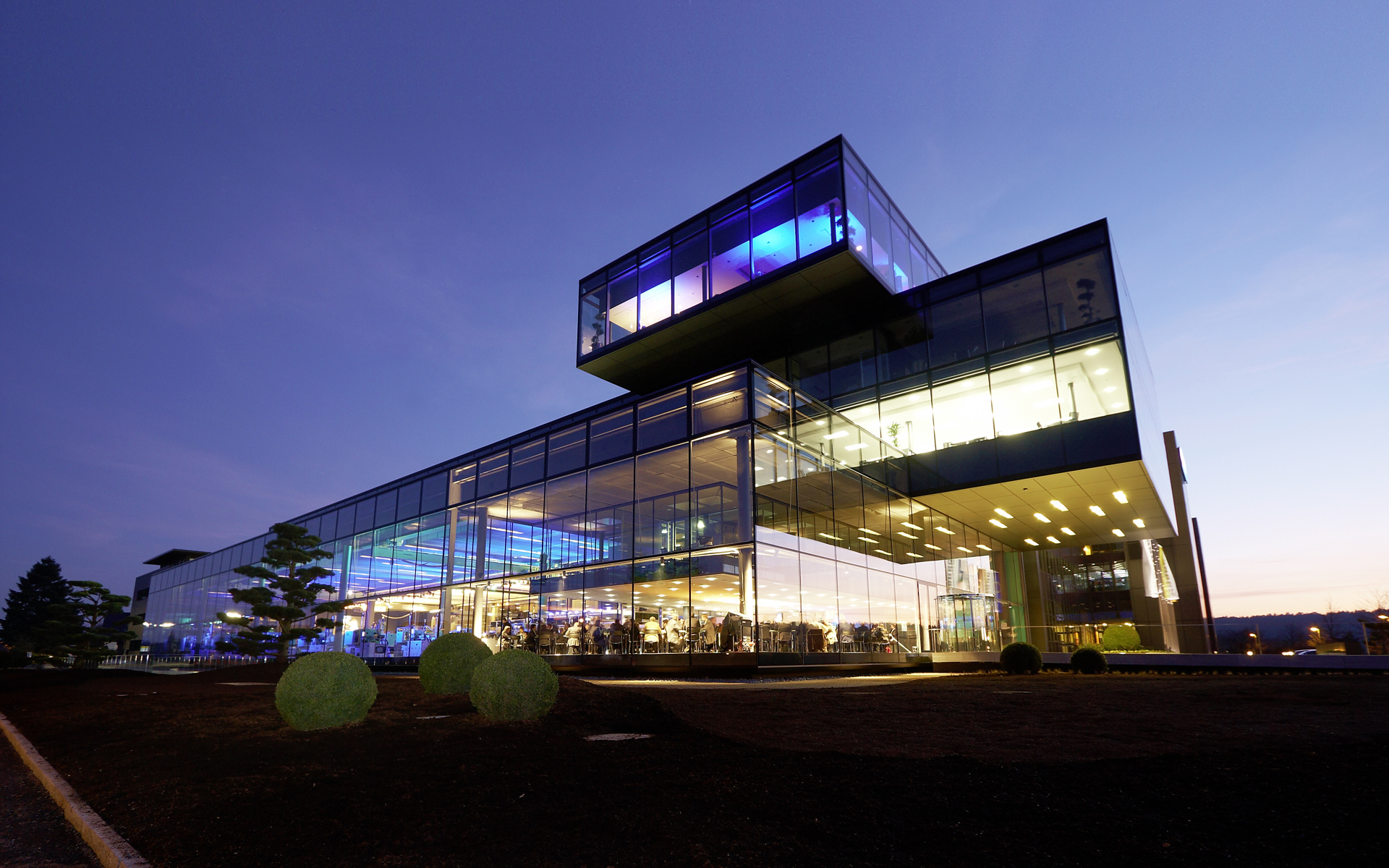 ARBURG Kundencenter in Loßburg